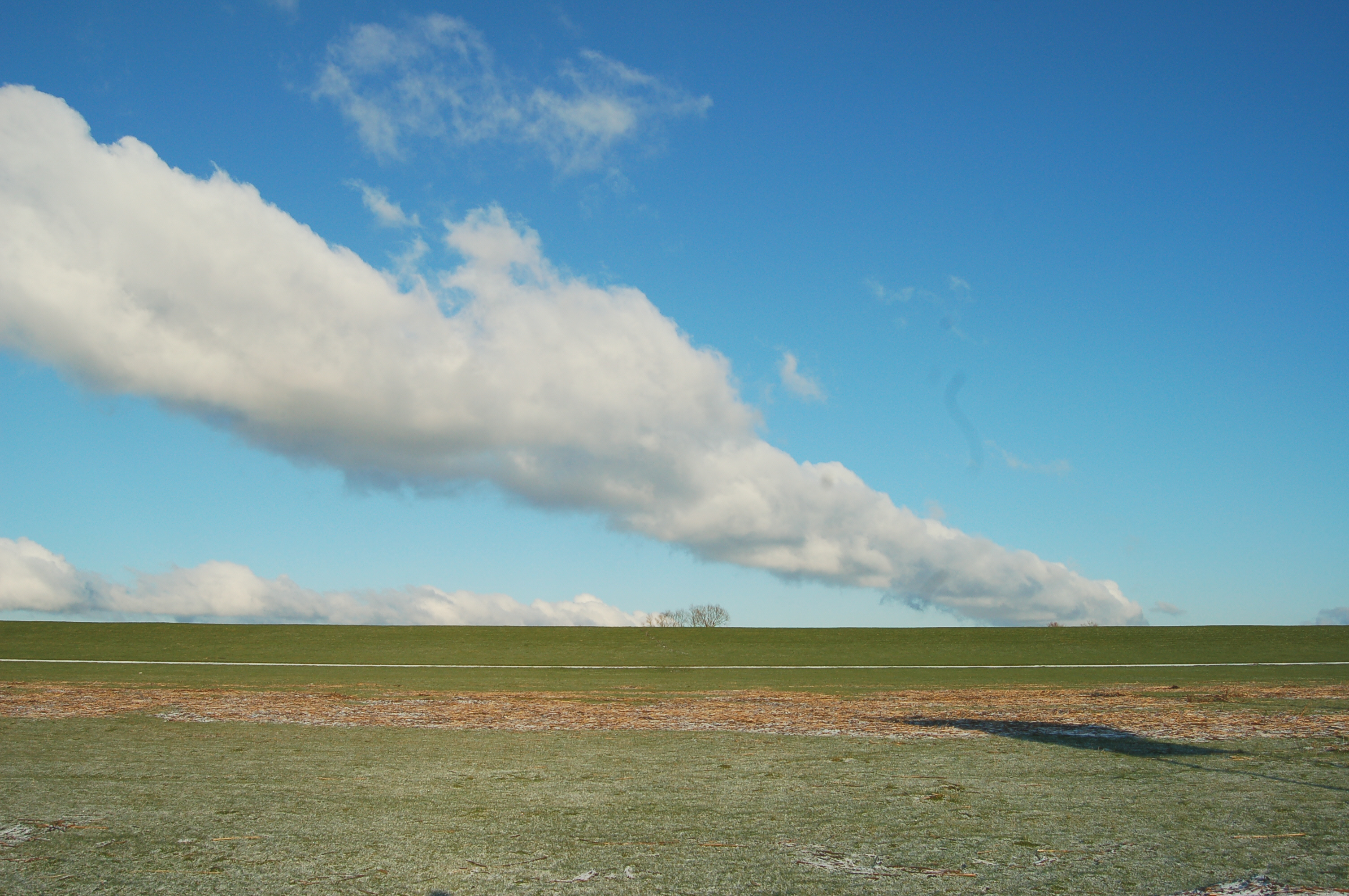 Wolkenstreifen in der Seestermüher Marsch an der Pinnaumündung.